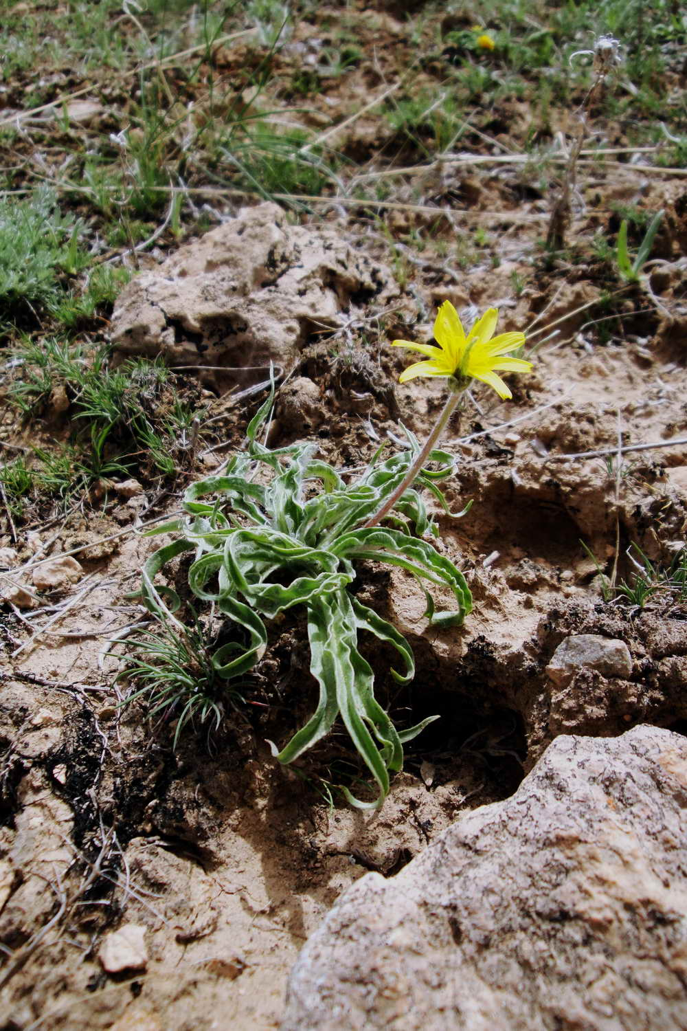 Scorzonera gorovanica, Խինձ գորովանի, Скорцонера горованская